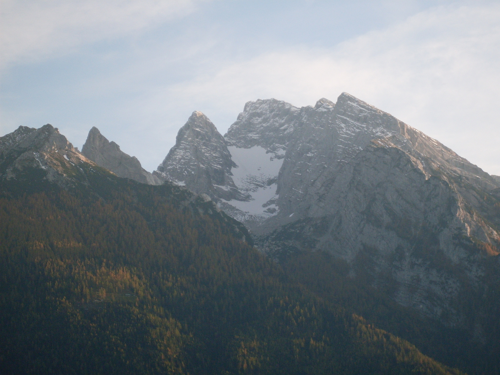 Hochkalter von Norden (Nähe Taubensee): Gipfel von links nach rechts: Steinberg, Schärtenspitze, Blaueisspitze, Hochkalter, Kleinkalter, Wasserwandkopf; in der Mitte das Blaueis